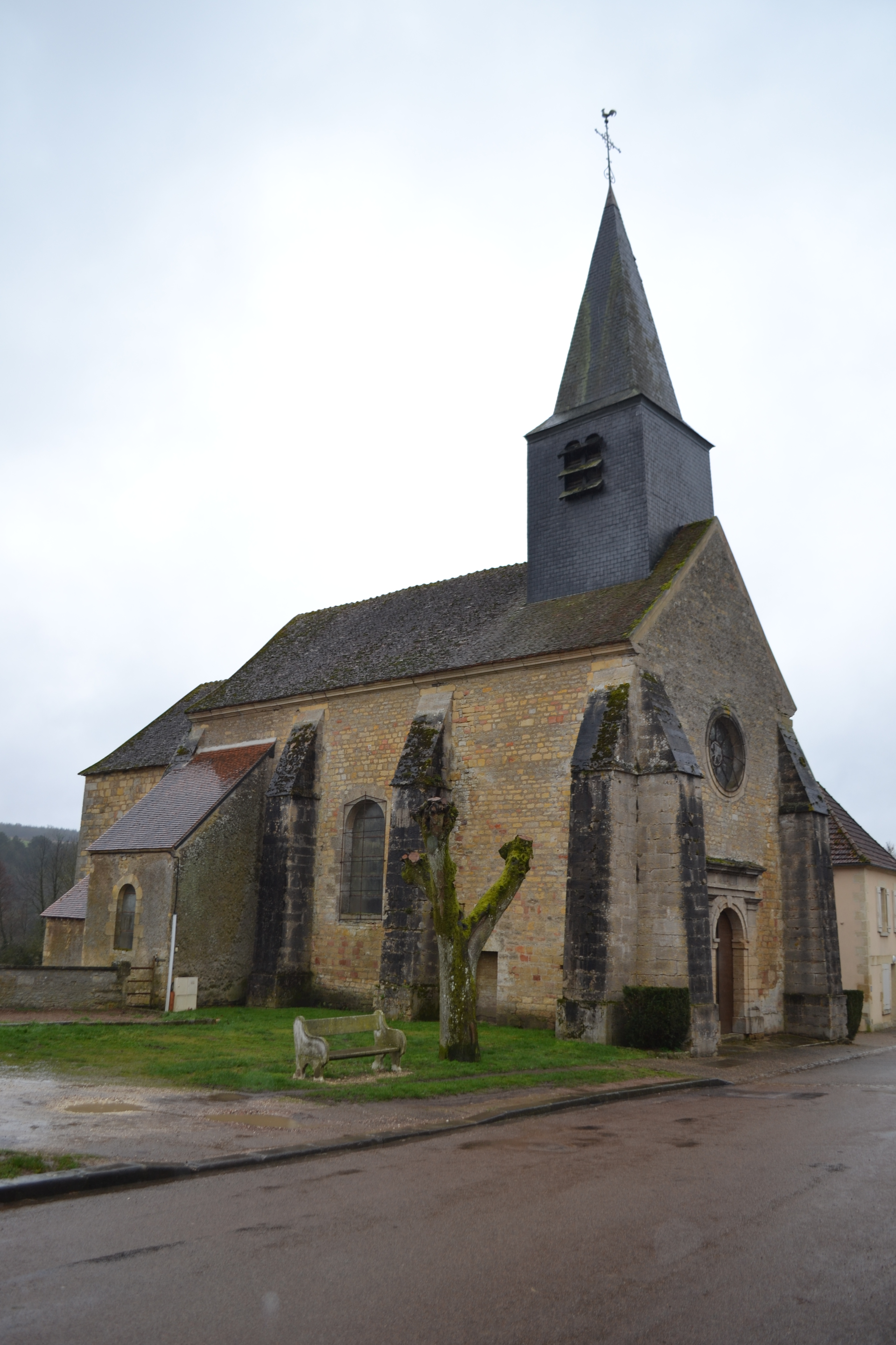 Eglise de Dompierre-sur-Nièvre (Nièvre).